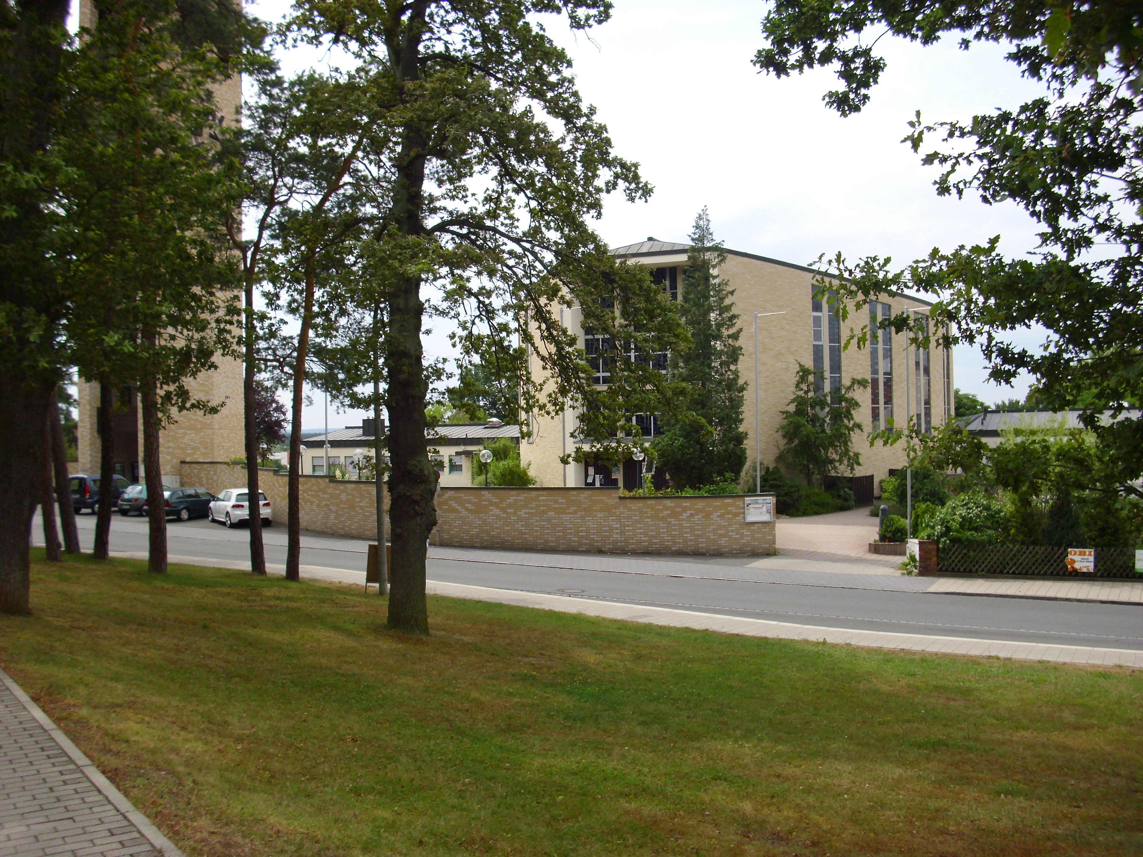 Außenansicht der 1967 geweihten katholischen Kirche Maria Heimsuchung in der Birkenallee 60 in Bubenreuth (Mittelfranken)